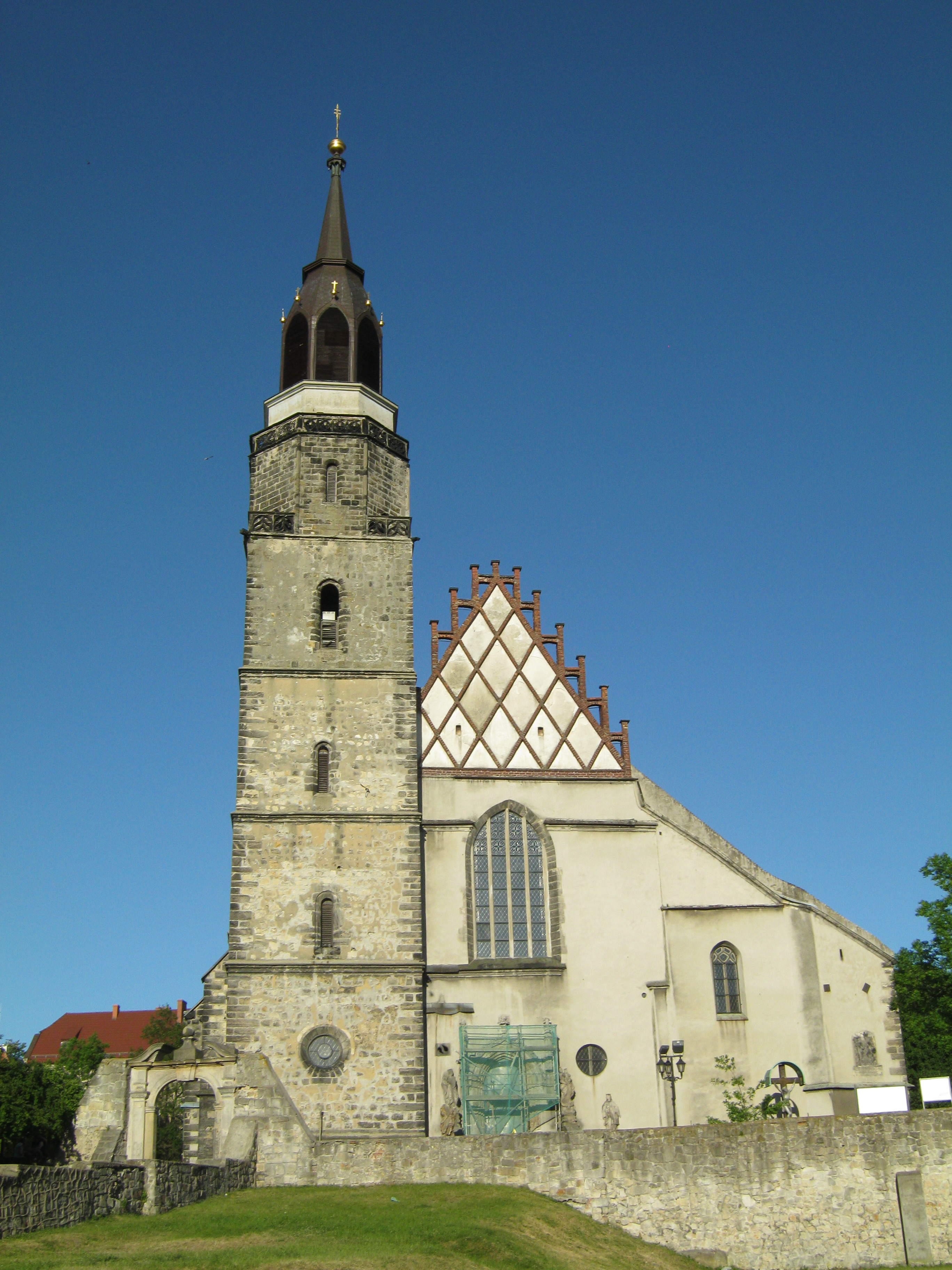 Bazylika mniejsza w Bolesławcu.